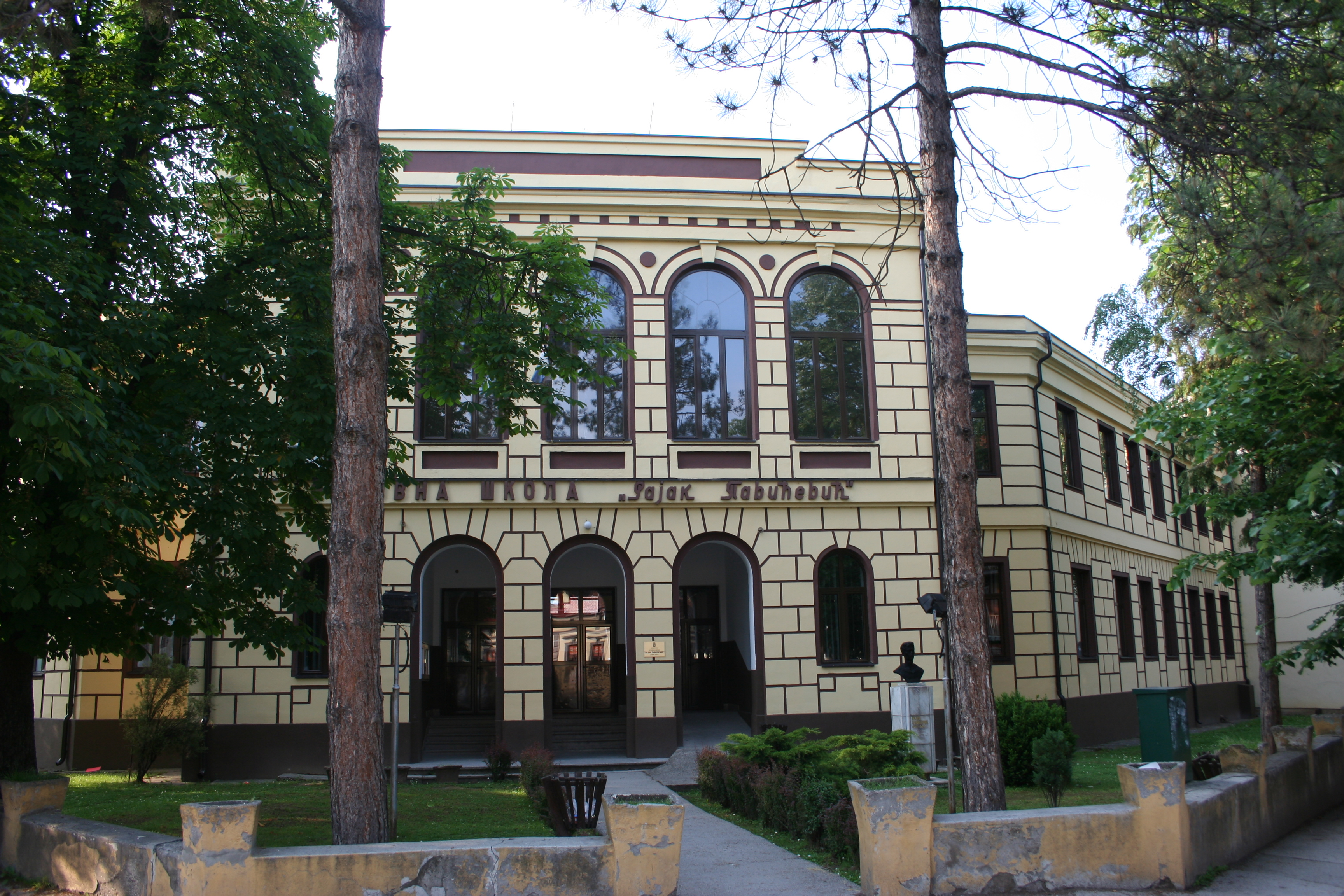 Bajina Bašta u maju 2017.